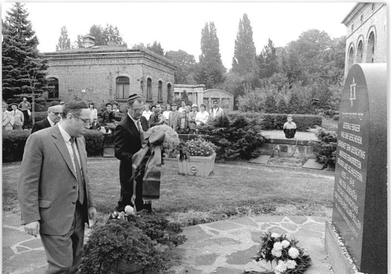 ADN-ZB-Schindler-11.9.88-Berlin: Gedenken an jüdische Opfer des Faschismus - Dr. Peter Kirchner, Vorsitzender der Jüdischen Gemeinde Berlin (r. mit Kranz) legte auf dem jüdischen Friedhof in der Weißenseer Herbert-Benz-Straße einen Kranz nieder.